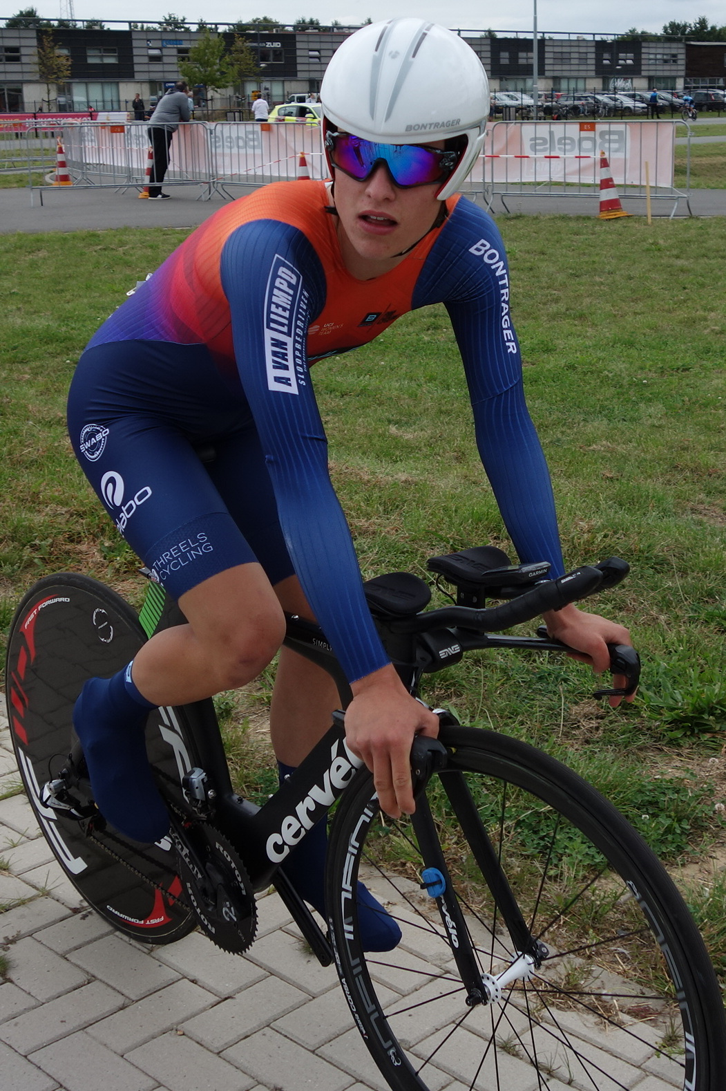 Teuntje Beekhuis (Biehler) bij de proloog op het Tom Dumoulin Bike Park in Sittard in de Boels Ladies Tour 2019